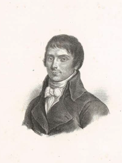 Dal Dizionario biografico degli uomini illustri di Sardegna di Pasquale Tola, 1837